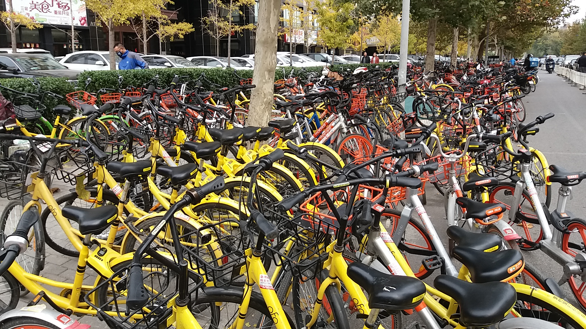 2017年11月8日北京东四环大成国际大厦前堵满人行道的共享单车